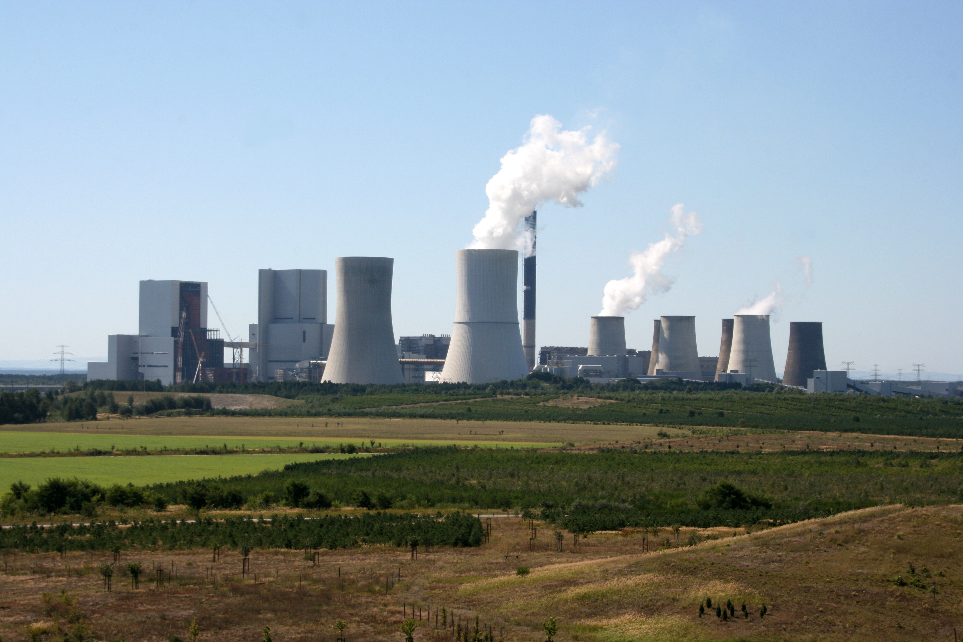 Kraftwerk Boxberg in Boxberg/O.L.